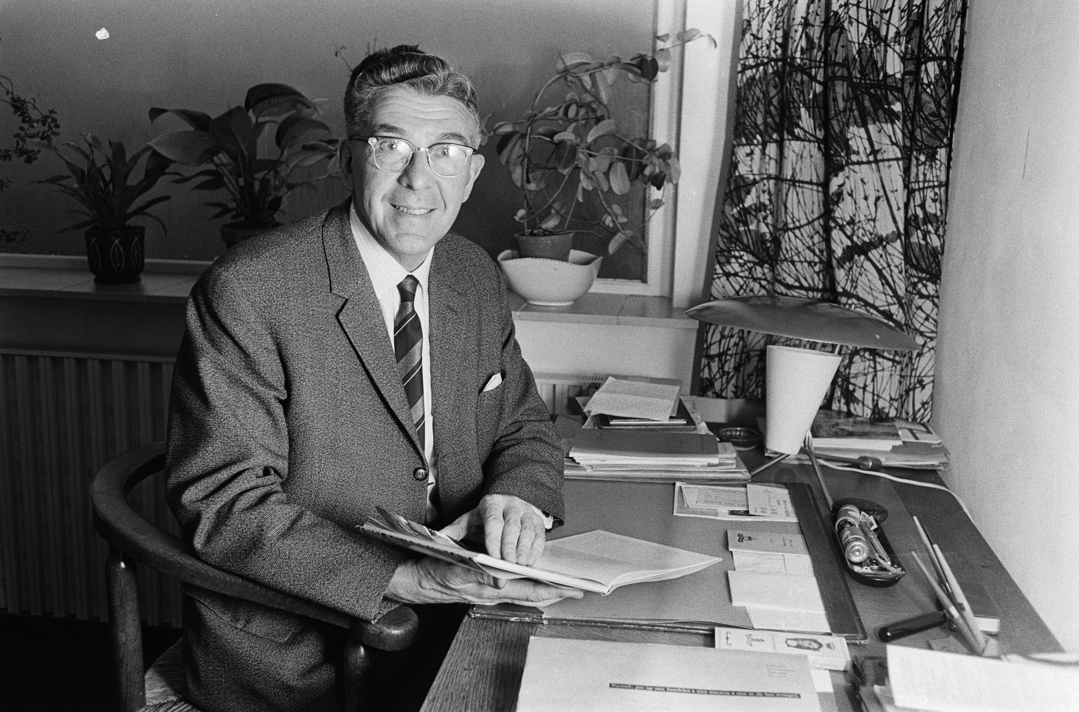 Collectie / Archief : Fotocollectie Anefo Reportage / Serie : [ onbekend ] Beschrijving : Burgemeester van Rotterdam W. Thomassen Datum : 15 februari 1965 Locatie : Rotterdam, Zuid-Holland Trefwoorden : burgemeesters, portretten Persoonsnaam : Thomassen, Wim Fotograaf : Koch, Eric / Anefo Auteursrechthebbende : Nationaal Archief Materiaalsoort : Negatief (zwart/wit) Nummer archiefinventaris : bekijk toegang 2.24.01.05 Bestanddeelnummer : 917-4361